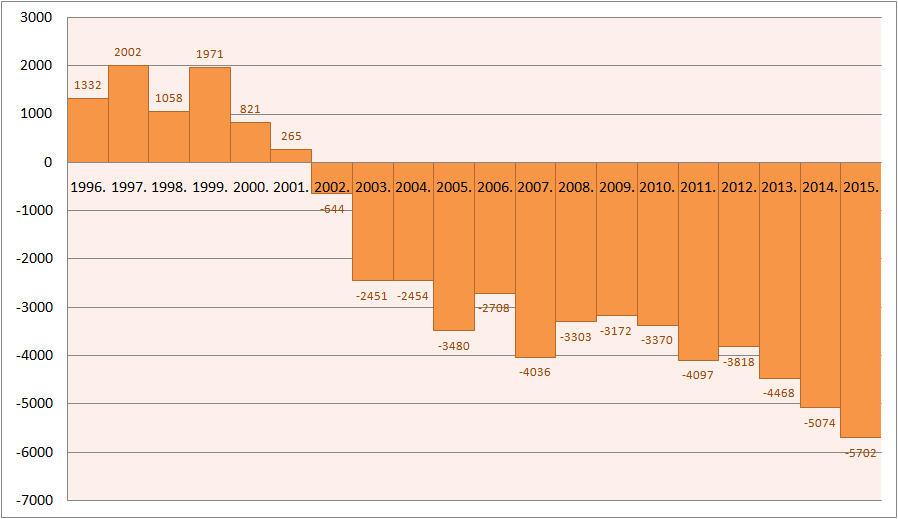 Српски (ћирилица): Природни прираштај у Републици Српској